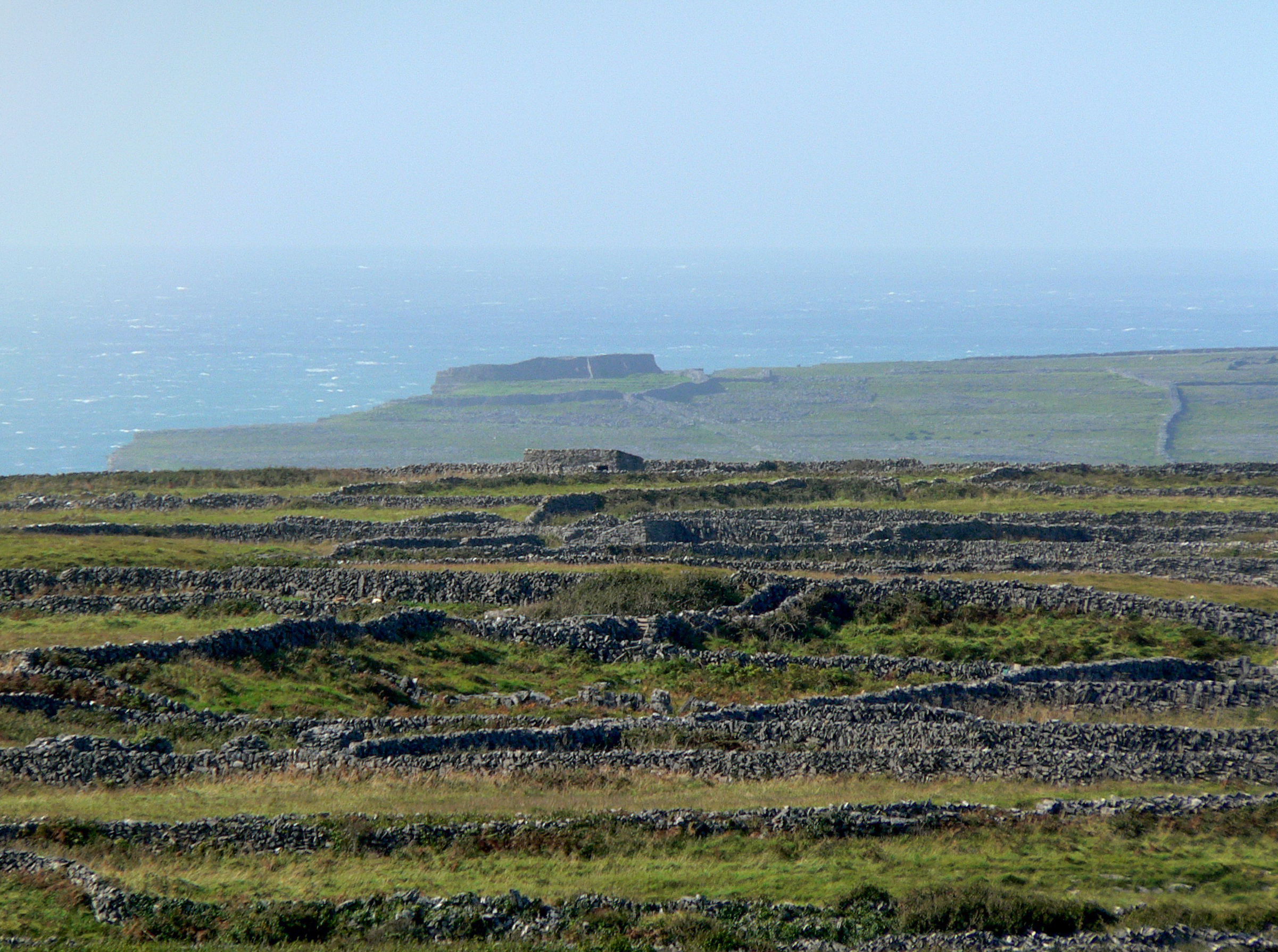 Widok z latarni morskiej w centrum wyspy Inishmore (Wyspy Aran) w kierunku północno-zachodnim z widokiem na prehistoryczny fort Dún Aengus. Zdjęcie wykonane przez Scythian 27 września 2005.